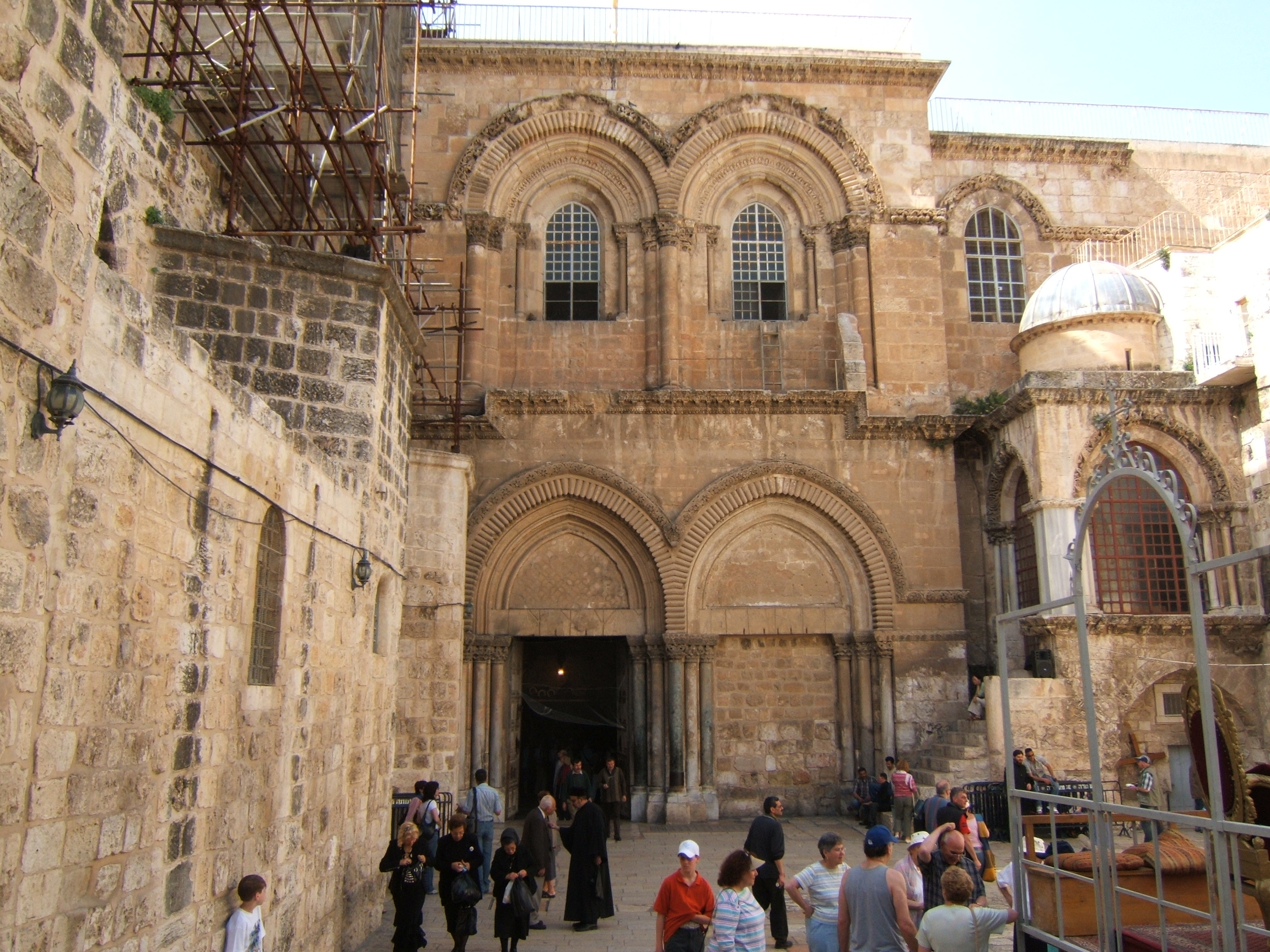 Entrada a la iglesia del Santo Sepulcro. Jerusalén, Israel.